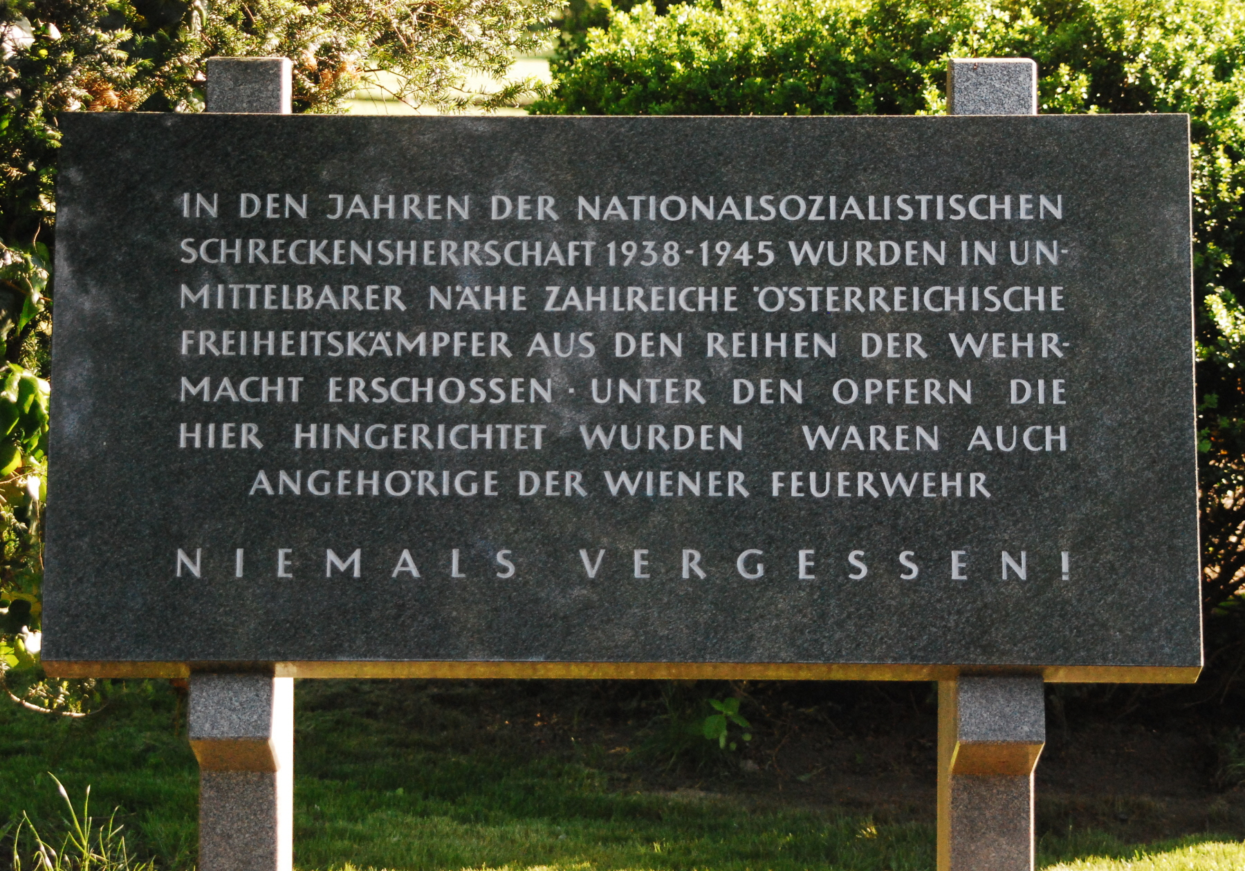 Gedenkstein für die hier im heutigen Donaupark während der NS-Zeit hingerichteten Personen